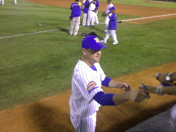 Michael ryan practica con magallanes